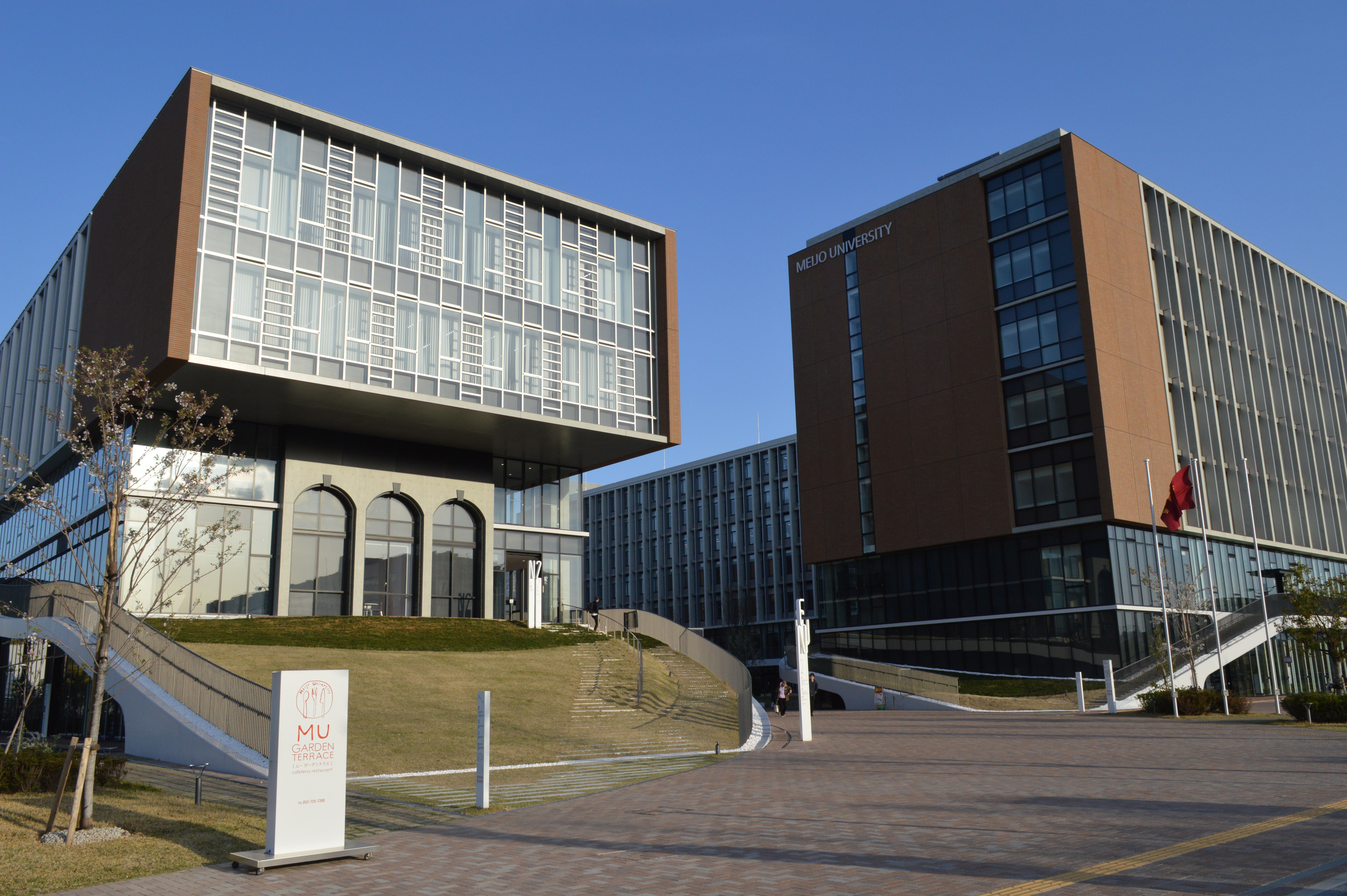 名古屋市東区の名城大学ナゴヤドーム前キャンパス。